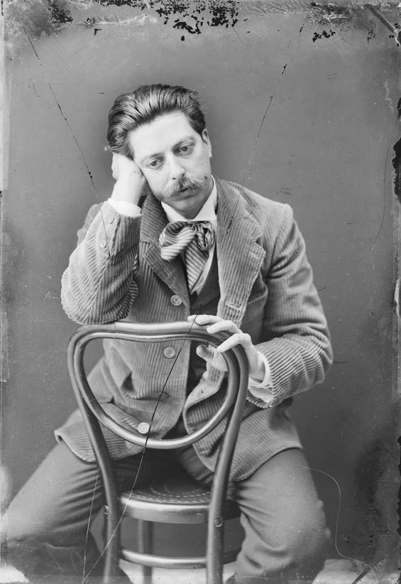 Retrat de tres quarts de cos del músic Enric Granados i Campiña assegut